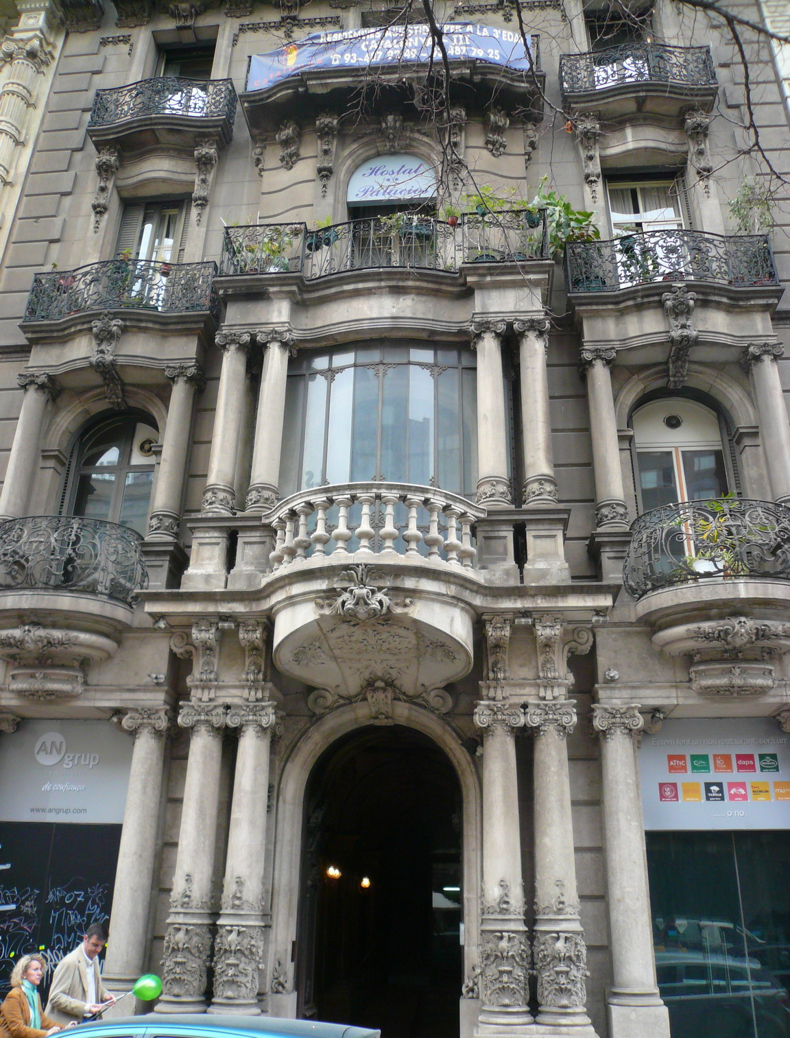 Casa Climent Arola, a la Rambla de Catalunya 27 de Barcelona, obra de 1900-1902 de l'arquitecte Francesc de Paula del Villar i Carmona